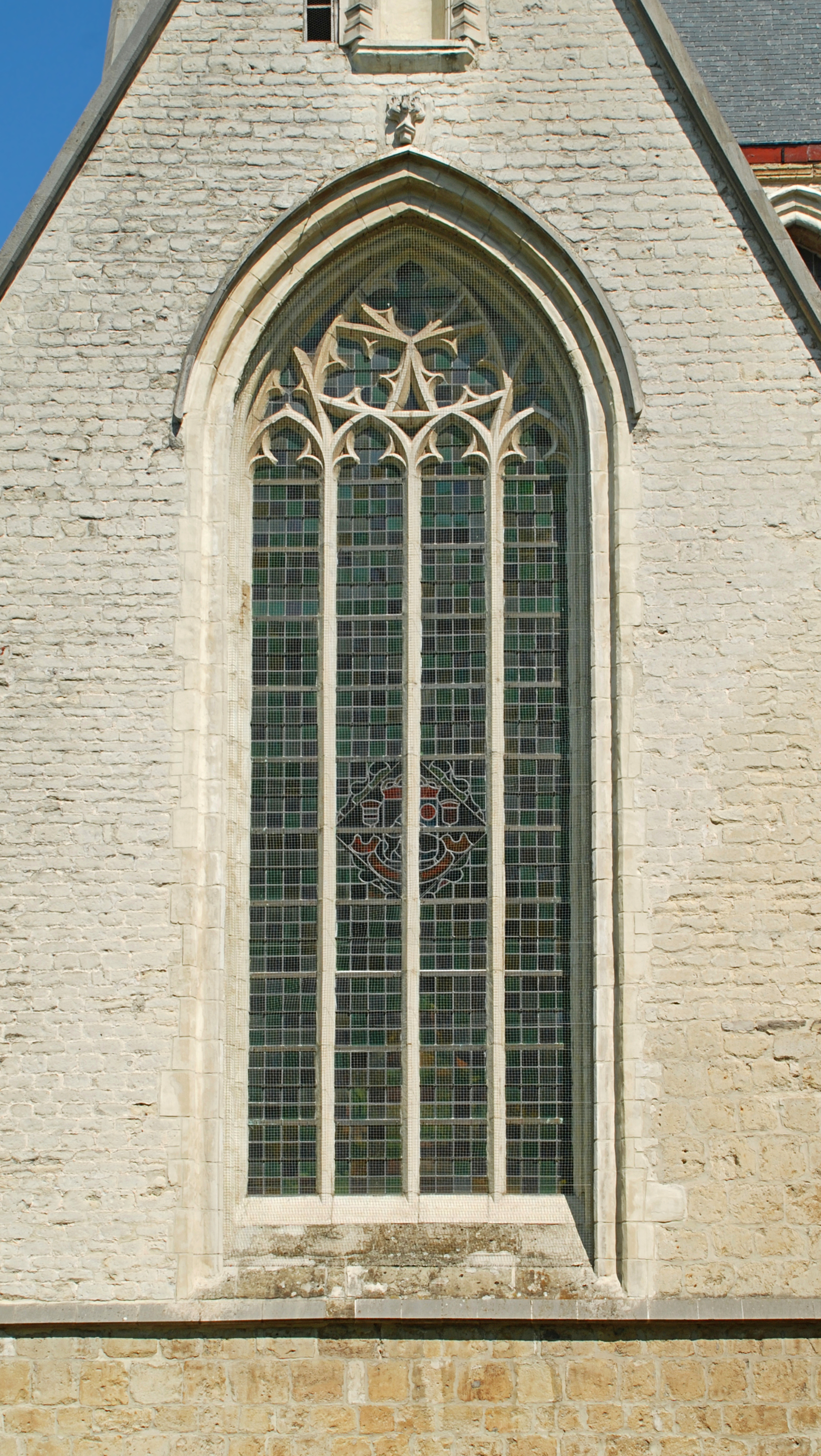 Belgique - Termonde - Église Notre-Dame